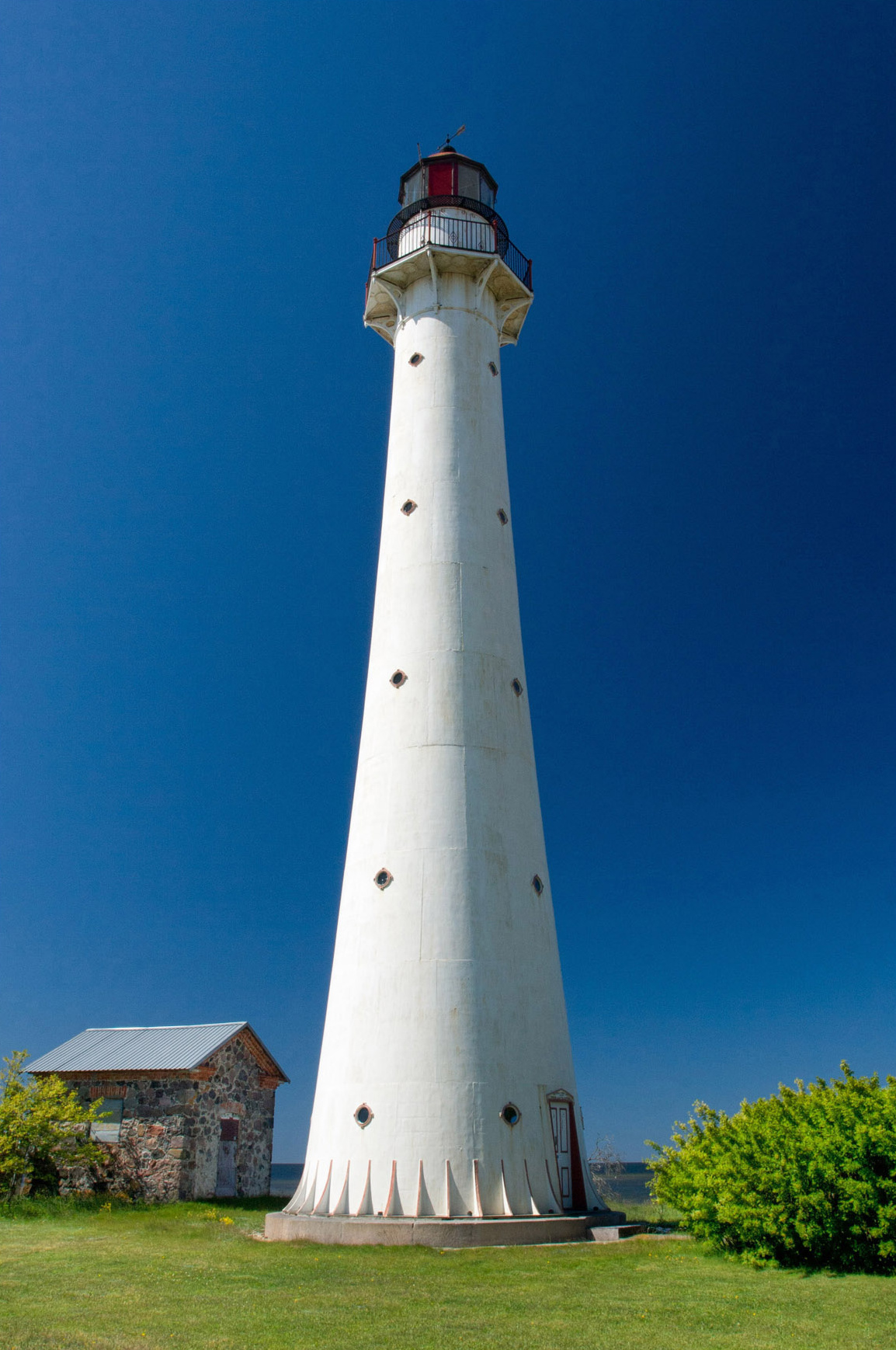 Kihnu tuletorn